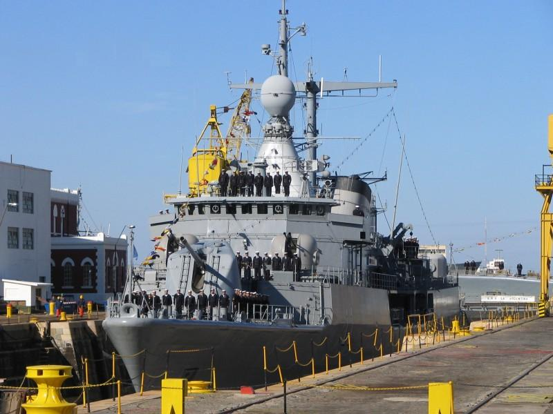 Meko 360 H2 Destroyer (D-11) ARA "La Argentina